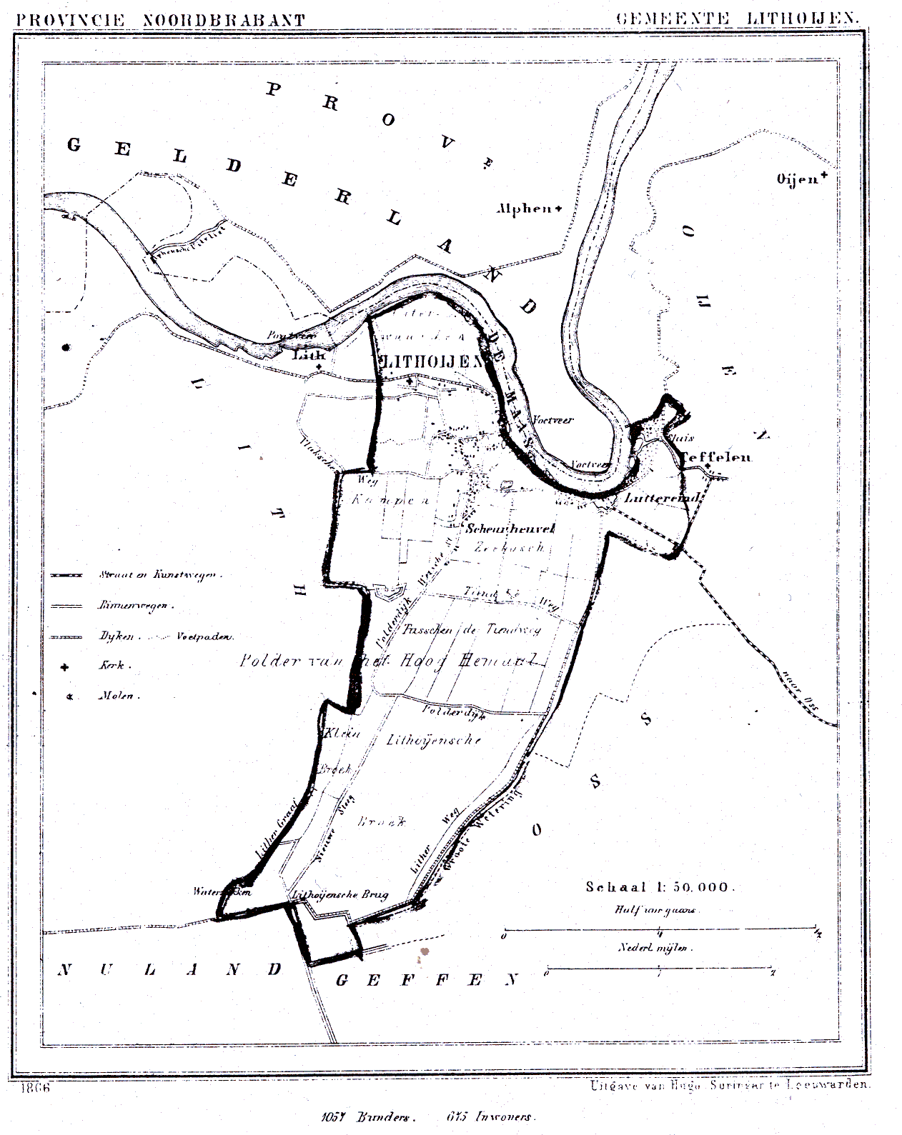 Nederland, Noord-Brabant, Gemeente Lithoijen